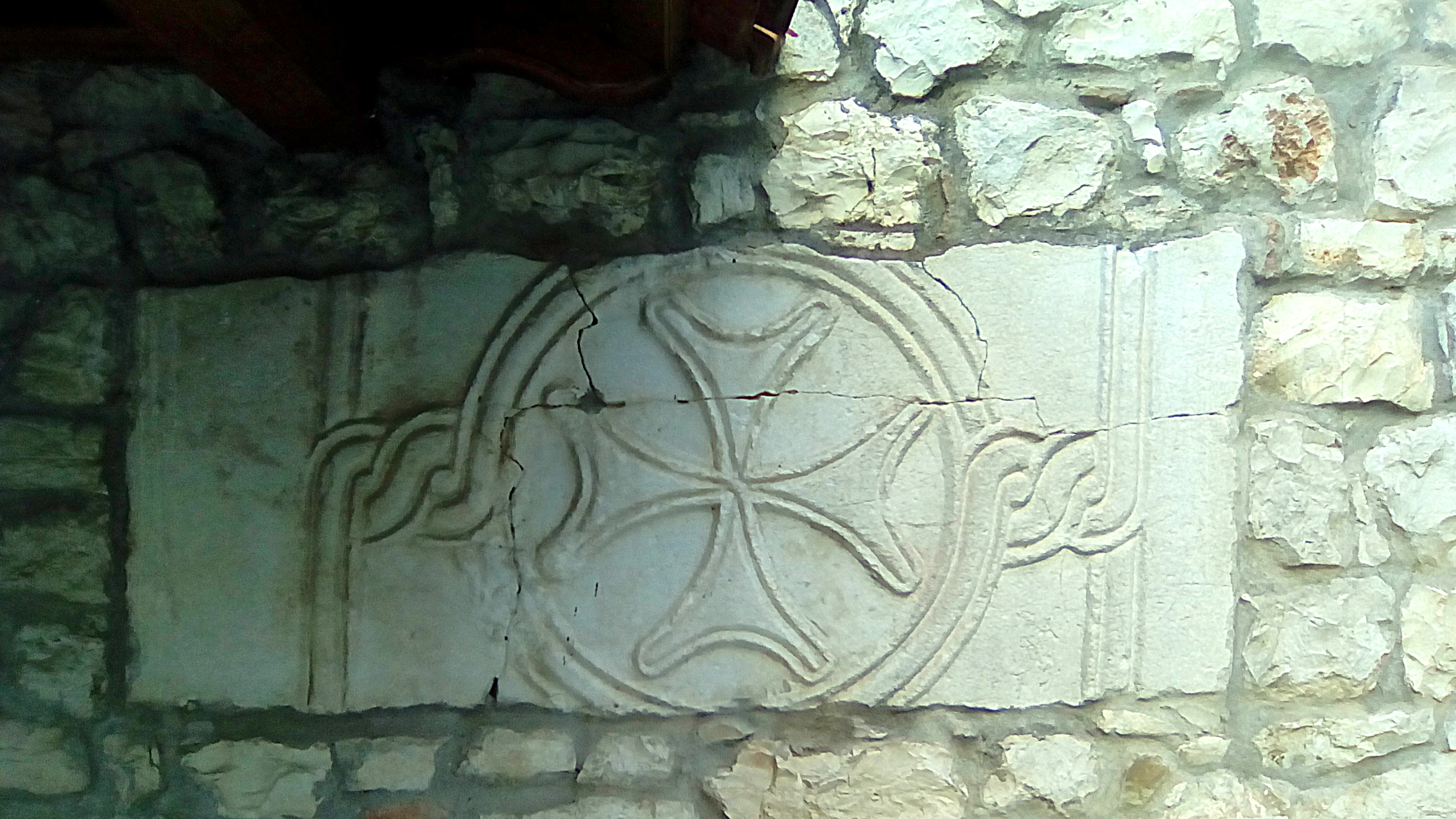 Σταυρός Μάλτας στον ναό της Παναγιάς Κασσωπίτρας (Άρτα)